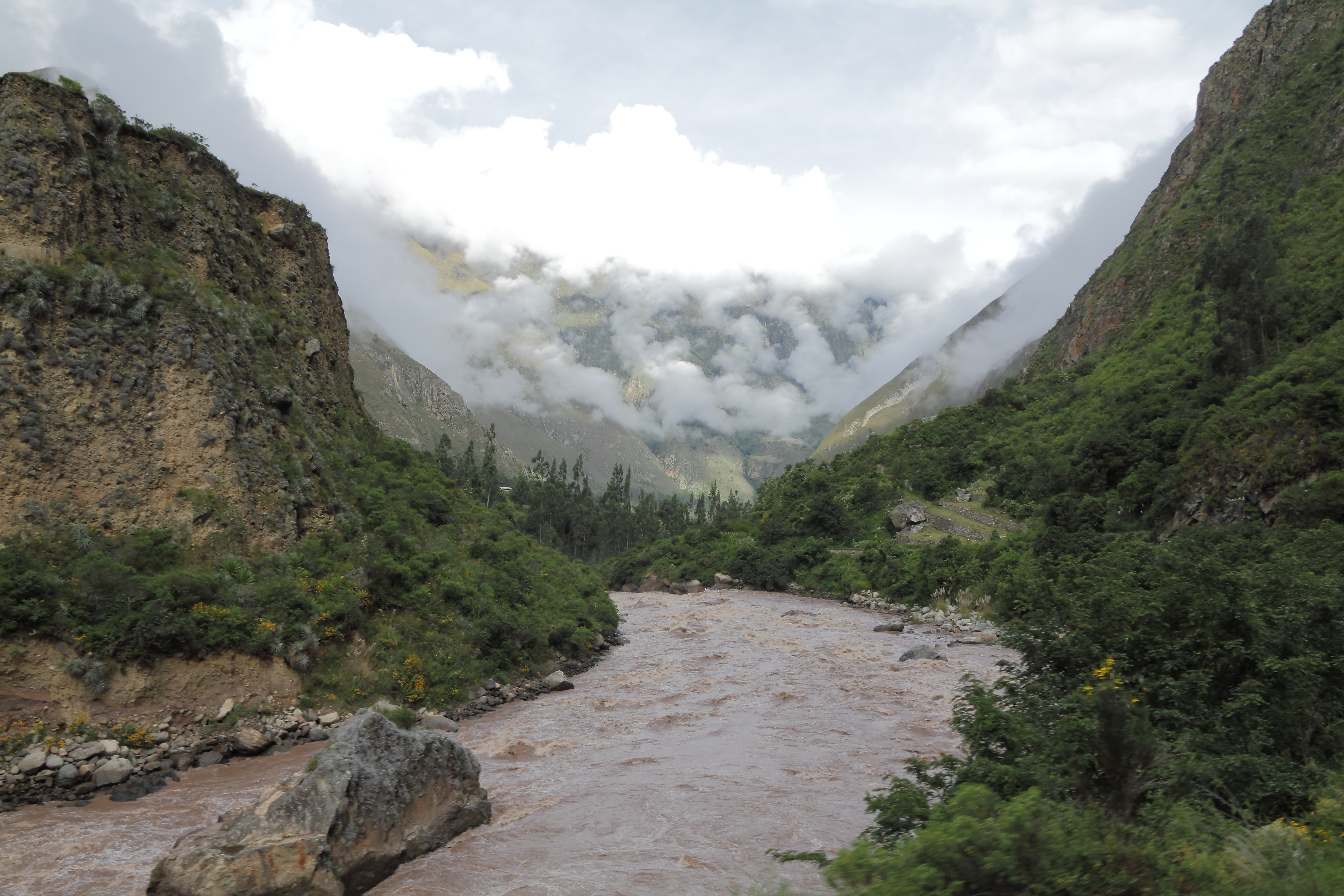 Machu Picchu, Cusco, Peru.